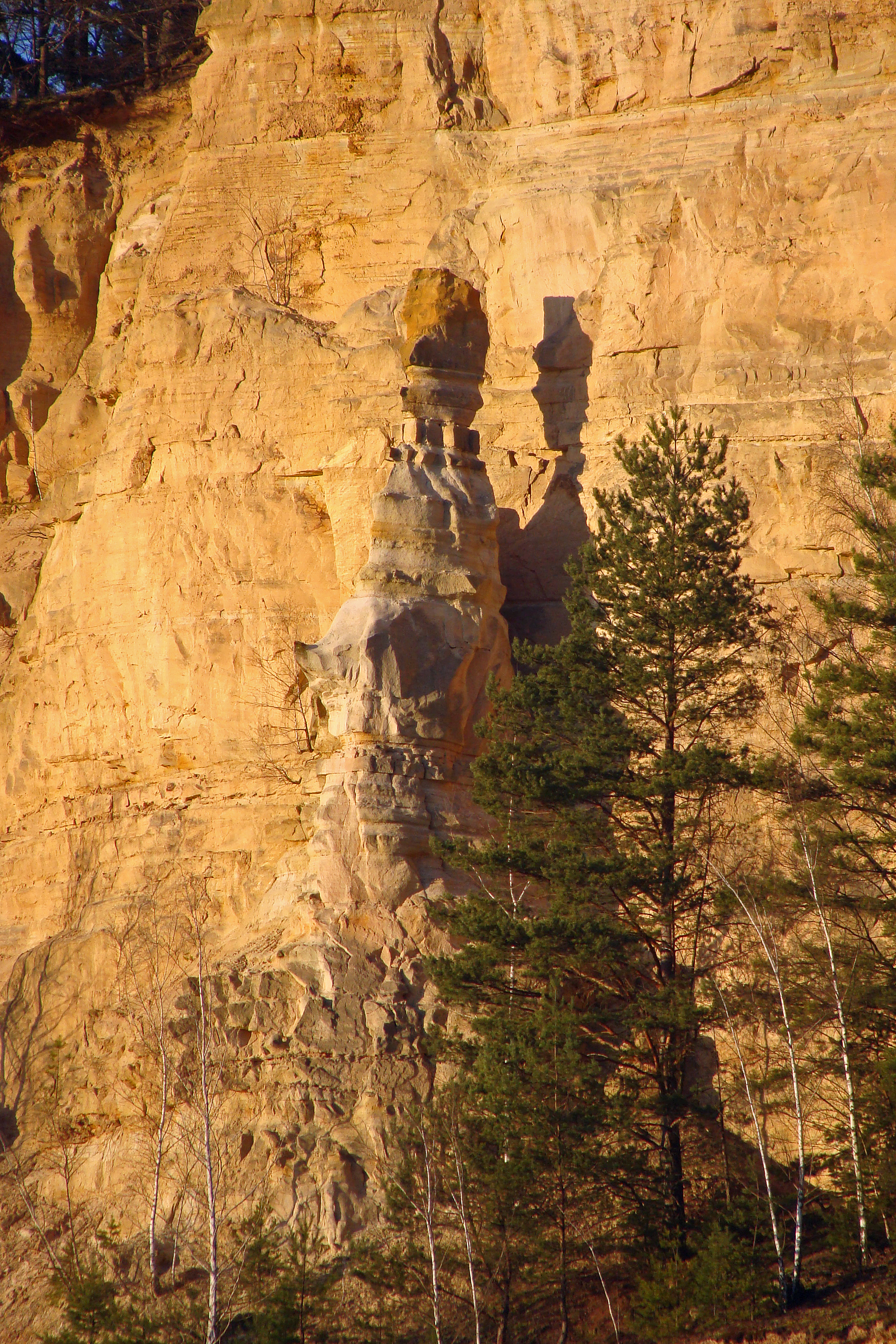 Cheminée de fée, carrière du Barrois (entre les villes de L'Hôpital et Freyming-Merlebach). Photographie prise le 9 mars 2014. Période géologique: Trias (Bundsandstein).